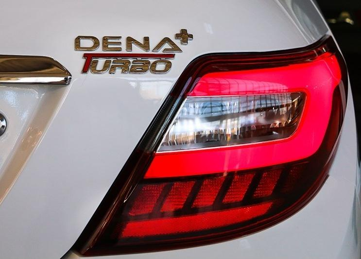 سومین نمایشگاه بین‌المللی خودروی تهران - ۲۱ دی ۱۳۹۷